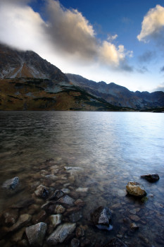 Dolina Pięciu Stawow Polskich